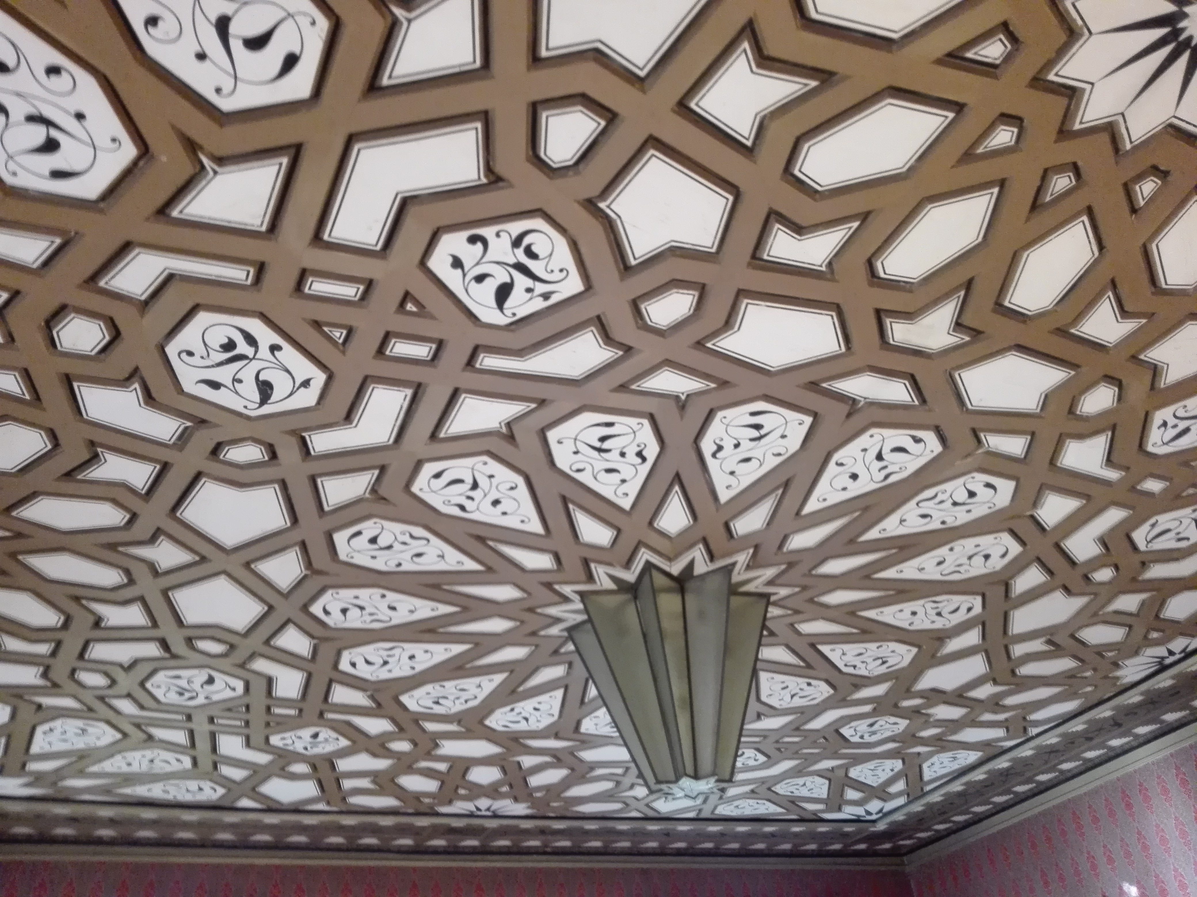 Zimmerdecke im orientalischen Stil des Zimmers, welches einst Mary Gräfin Török von Szendrö alias Djavidan Hanum, Gemahlin des Herrn und türkischen Vizekönigs von Ägypten bewohnte